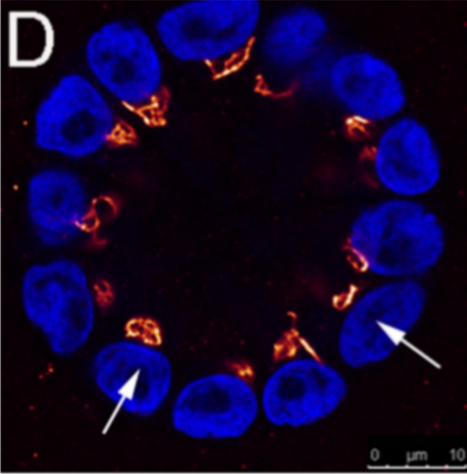 Figura 5. Hugl regula la polaridad apicobasal y la formación de luz en acinos mamarios. Las células se incubaron con anticuerpos primarios marcando su dominio apical (anti-GM130, en rojo), seguidos de anticuerpos secundarios marcados con fluorescencia. Núcleos teñidos con DAPI (en azul). Se tomaron imágenes de Acinos con un microscopio confocal. Barra de escala= 10 micras